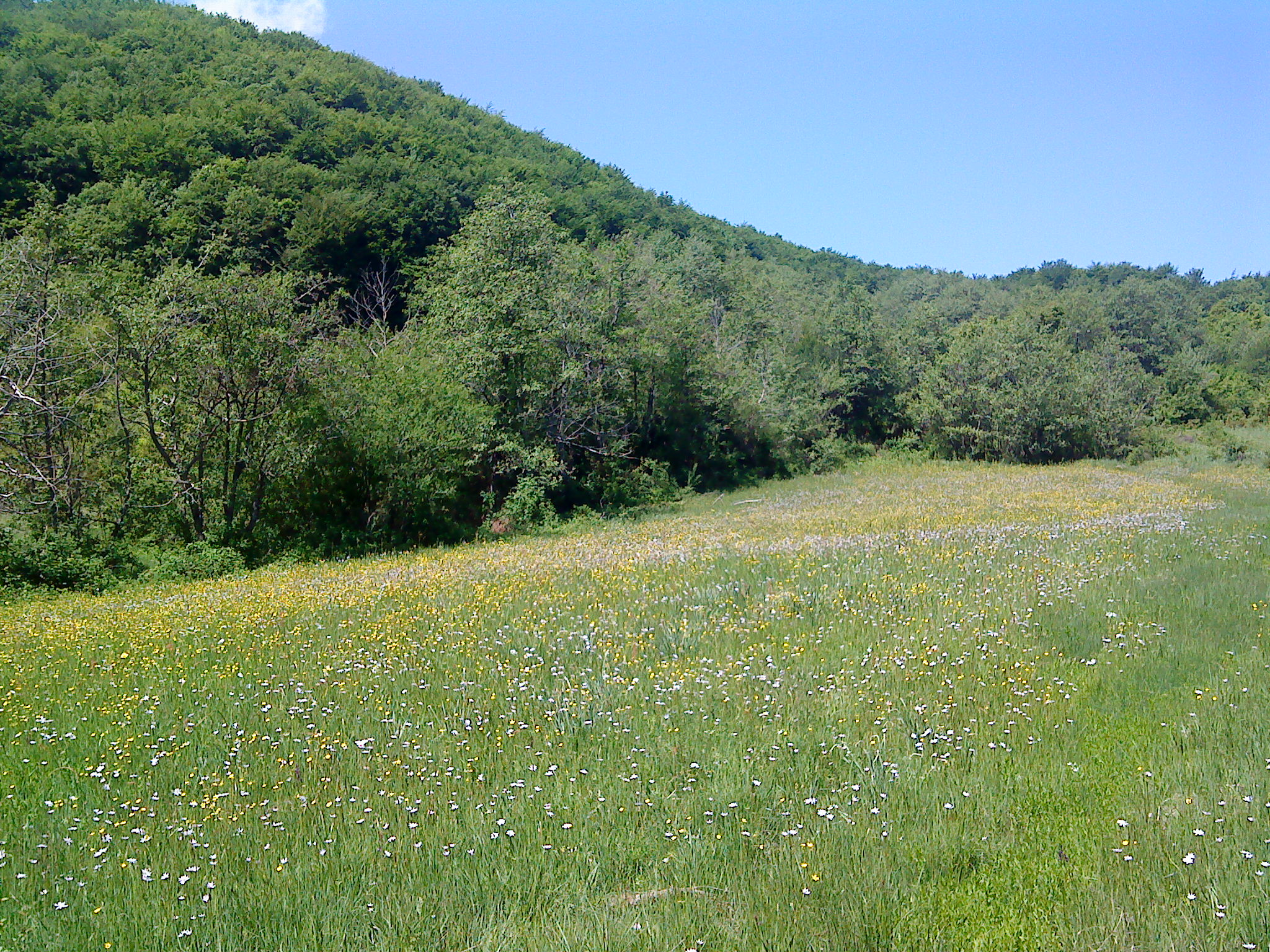 Висорамнина - Студена Чешма – Јашарова Кула